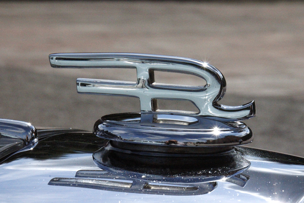 Röhr 8 Typ F Cabriolet 4-Fenster (1934) Hans Gustav Röhr gründete am 30. Oktober 1926 zusammen mit Hugo Greffenius, Hauptaktionär der MIAG, die Röhr Auto AG. Zusammen hatten beide ein Startkapital von ca. 500.000 Reichsmark. Im selben Jahr wurde das Gelände der Falcon Automobilwerke in Ober-Ramstadt übernommen. Im Herbst 1927 begann die Produktion des Röhr 8, dem der 1928 in Berlin erstmals der Öffentlichkeit vorgestellte Röhr 8 Typ R folgte. Das Fahrzeug war ein wirtschaftlicher Erfolg und man erreichte im selben Jahr einen Auftragsbestand von 2.200 Röhr-Wagen. Röhr beschäftigte 1929 etwa 800 Mitarbeiter. 1930 während der Weltwirtschaftskrise, mussten die „Röhr Auto AG“ Konkurs anmelden. Anfang 1931 stoppte die Produktion vorerst. Die Röhr Auto AG wurde mit Einverständnis der Gläubiger vom schweizerischen Röhr-Generalvertreter Joos Andreas Heintz übernommen. Unter dem Namen Neue Röhr AG wurde im April 1931 die Produktion wieder aufgenommen, Hans Gustav Röhr verließ sein Unternehmen jedoch. Im Frühjahr 1932 wurde als neues Modell der Röhr Junior vorgestellt. Die Machtergreifung der Nationalsozialisten und deren anschließende Repressalien gegenüber jüdischem Kapital schwächten die Röhr AG nachhaltig. Im Dezember 1934 musste deswegen erneut Konkurs angemeldet werden. Die Werkstätten in Ober-Ramstadt wurden im Frühjahr 1935 geschlossen. Sämtliche Fertigungsunterlagen und Werkzeuge standen zum Verkauf. Stoewer sicherte sich die Produktionsrechte am Röhr Junior und fertigte ihn als Stoewer Greif Junior bis 1939. Der Rest ging zunächst an die Gesellschaft für die Verwertung von Industrieanlagen mbH, die bis 1936 noch einige Röhr F bauen ließ. Schließlich pachtete die Noll-Monnard KG die Räume der vormaligen Reparaturabteilung und überarbeitete den Röhr F nochmals, jedoch ohne die Produktion beginnen zu können. Im Sommer 1937 wurden die Bemühungen endgültig eingestellt. Quelle